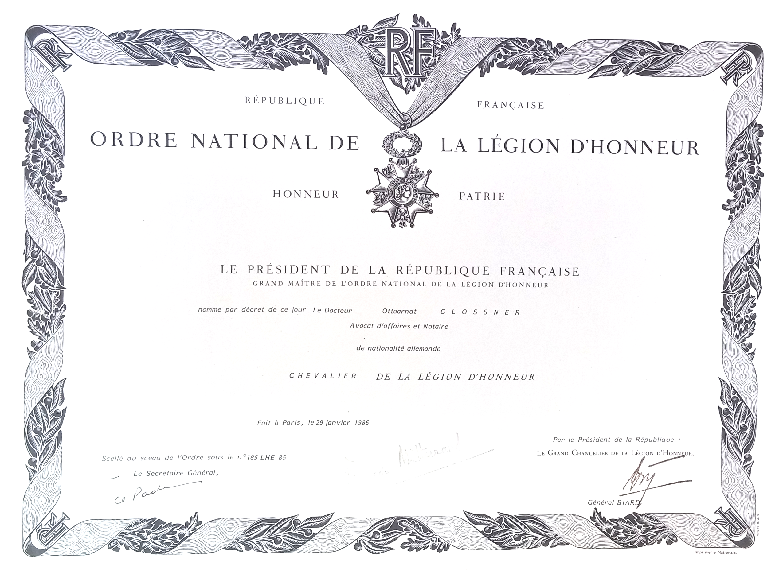 Am 29. Januar 1986 erhielt Rechtsanwalt Dr. Dr. Ottoarndt Glossner den französischen Verdienstorden (Ordre National De La Légion D'honneur), verliehen durch den Großkanzler der Ehrenlegion André Biard, Französische Republik.